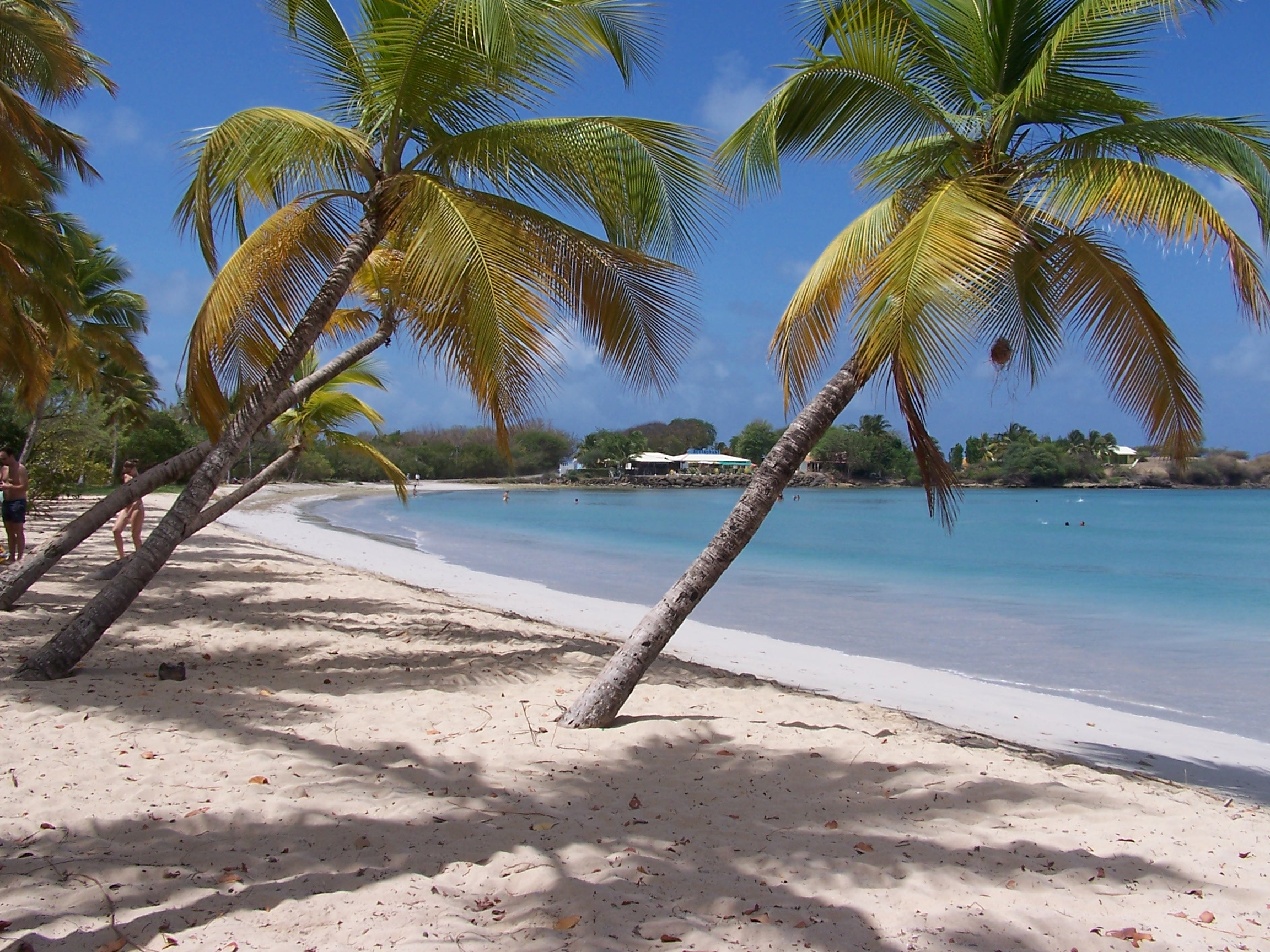 La plage des salines en Martinique